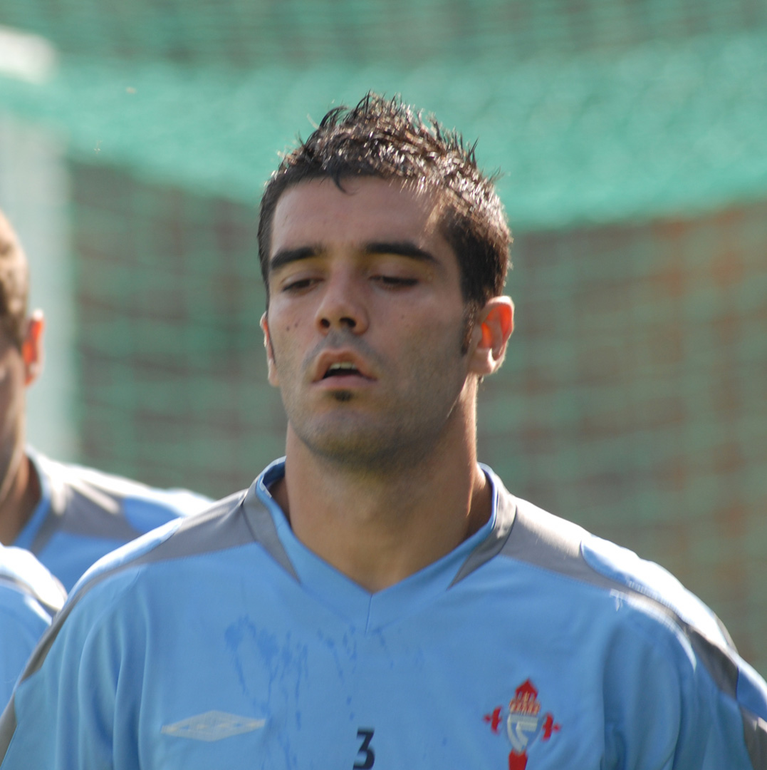 Iago Bouzón, futbolista do Celta de Vigo. Publish by= Luis Miguel Bugallo Sánchez.